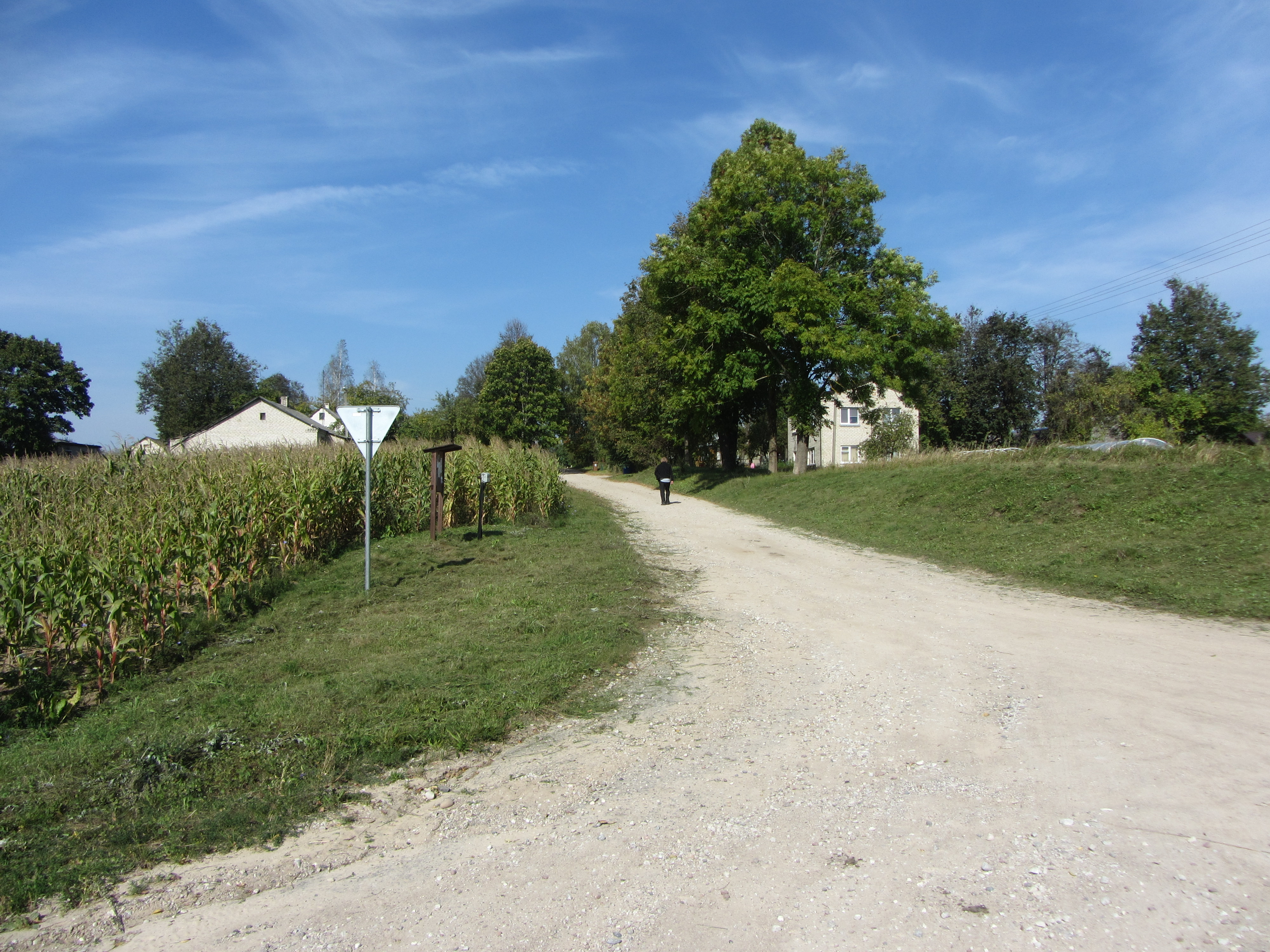 Druckūnai 65402, Lithuania